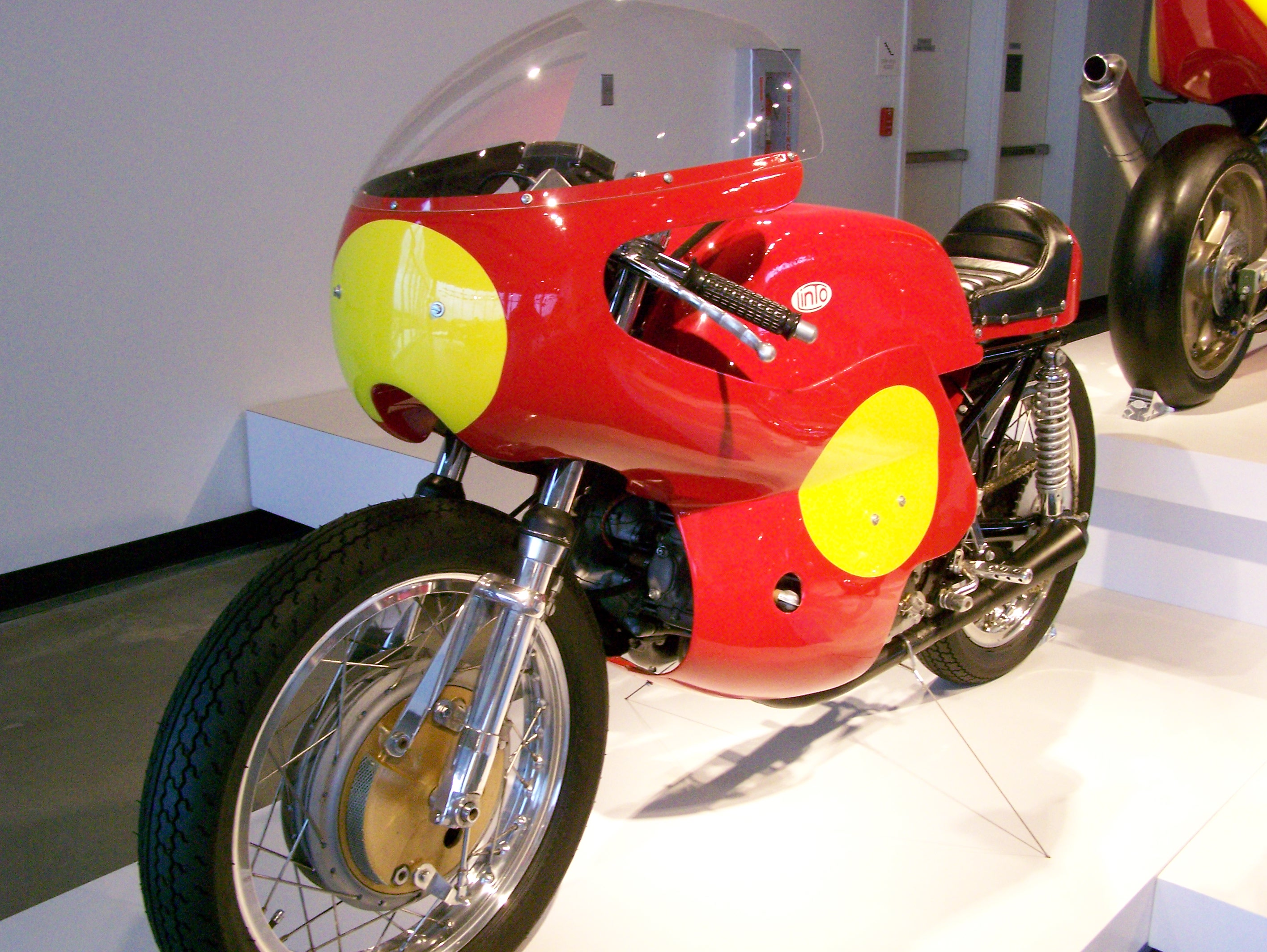 Linto 500 GP del 1969 conservata al Barber Vintage Motorsports Museum di Birmingham